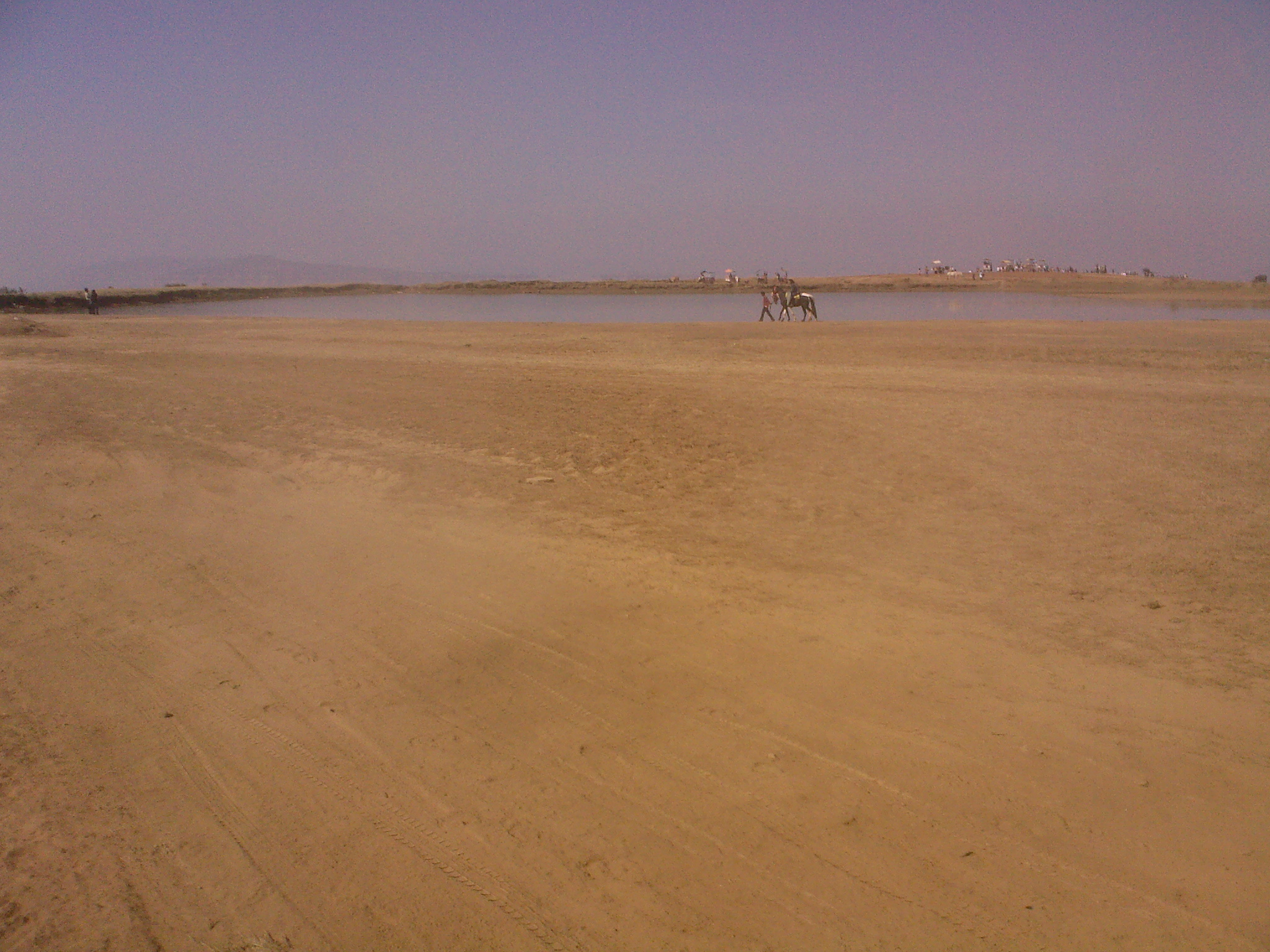 table land , mahabaleshwar